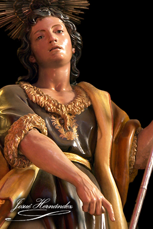 San Juan Bautista. 1819. Fernando Estévez de Salas (1788-1854). Basílica de San Juan Bautista y Santuario del Stmo. Cristo de Telde, Telde. Canarias